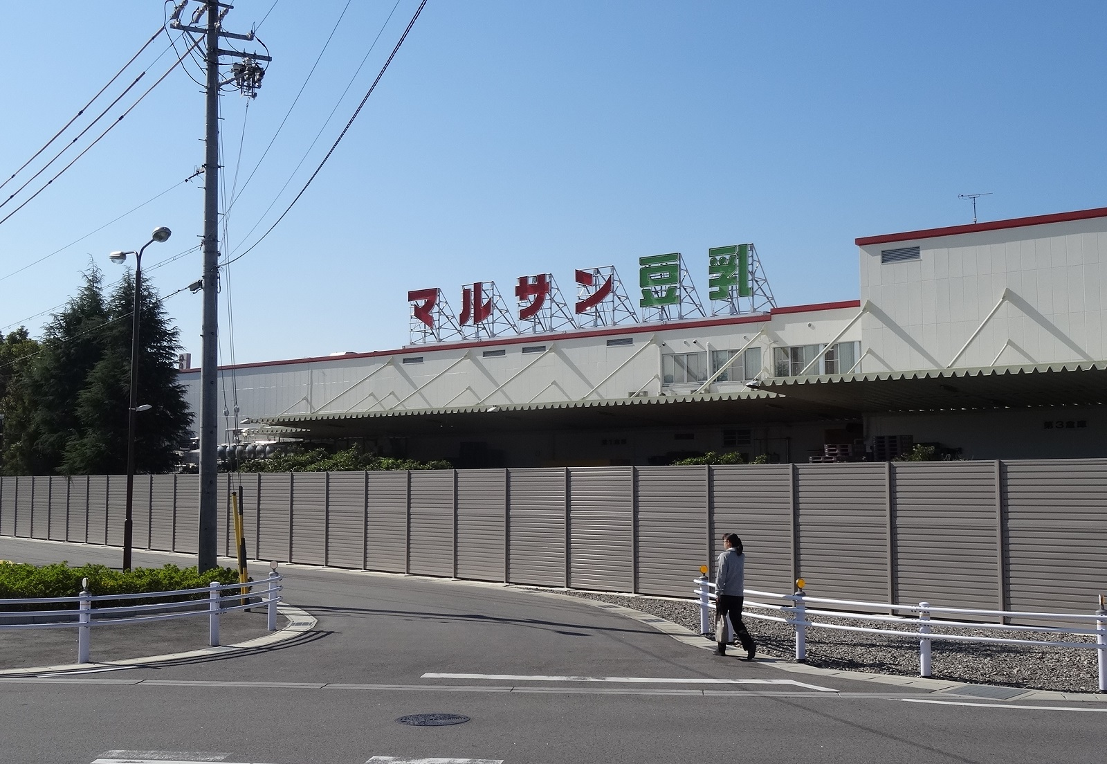 マルサンアイ株式会社本社（岡崎市仁木町）